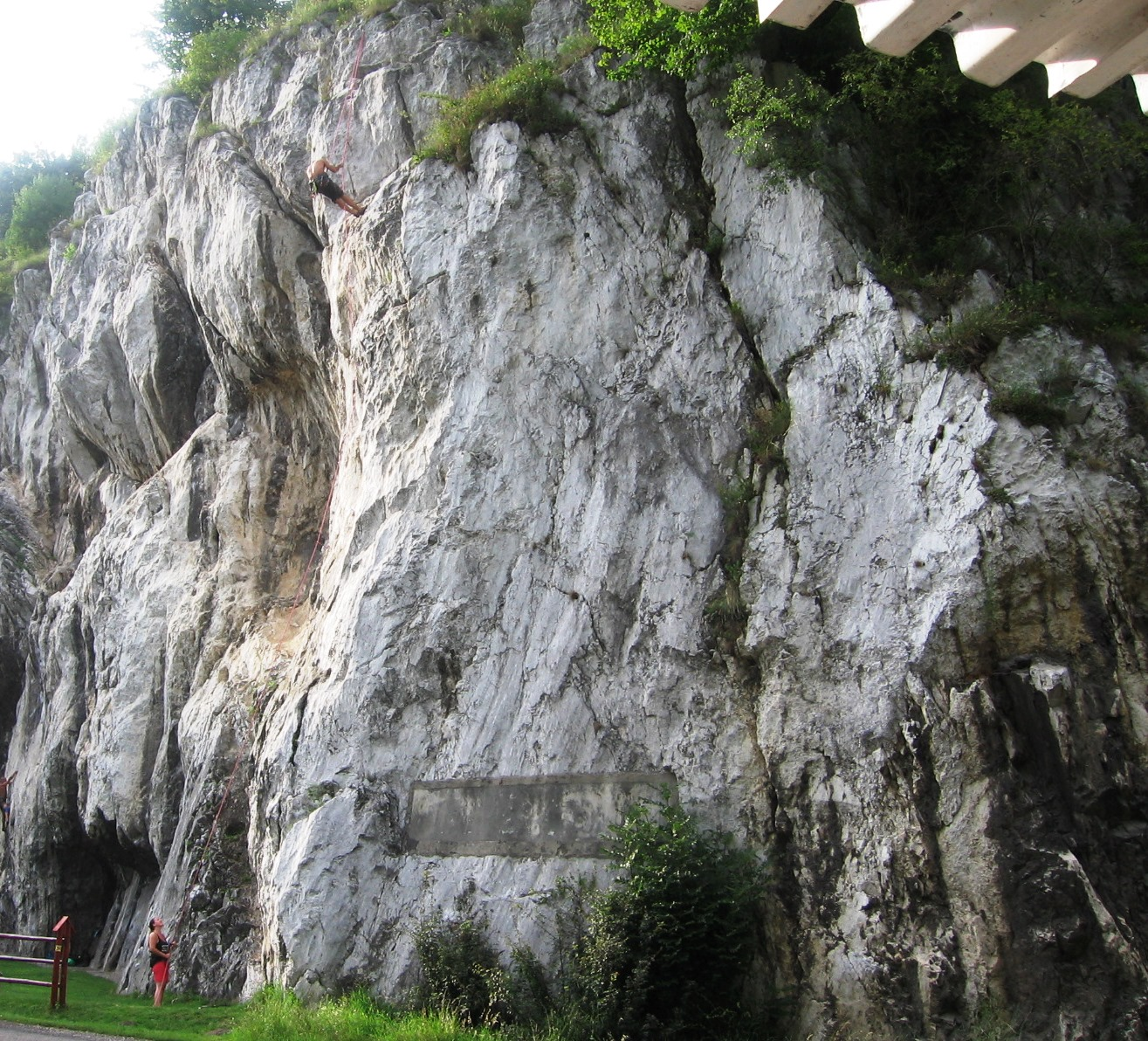 Felső-Hámor, Lillafüred szomszédos települése a Bükkben, Miskolc közelében. Itt van ez a mászófal.